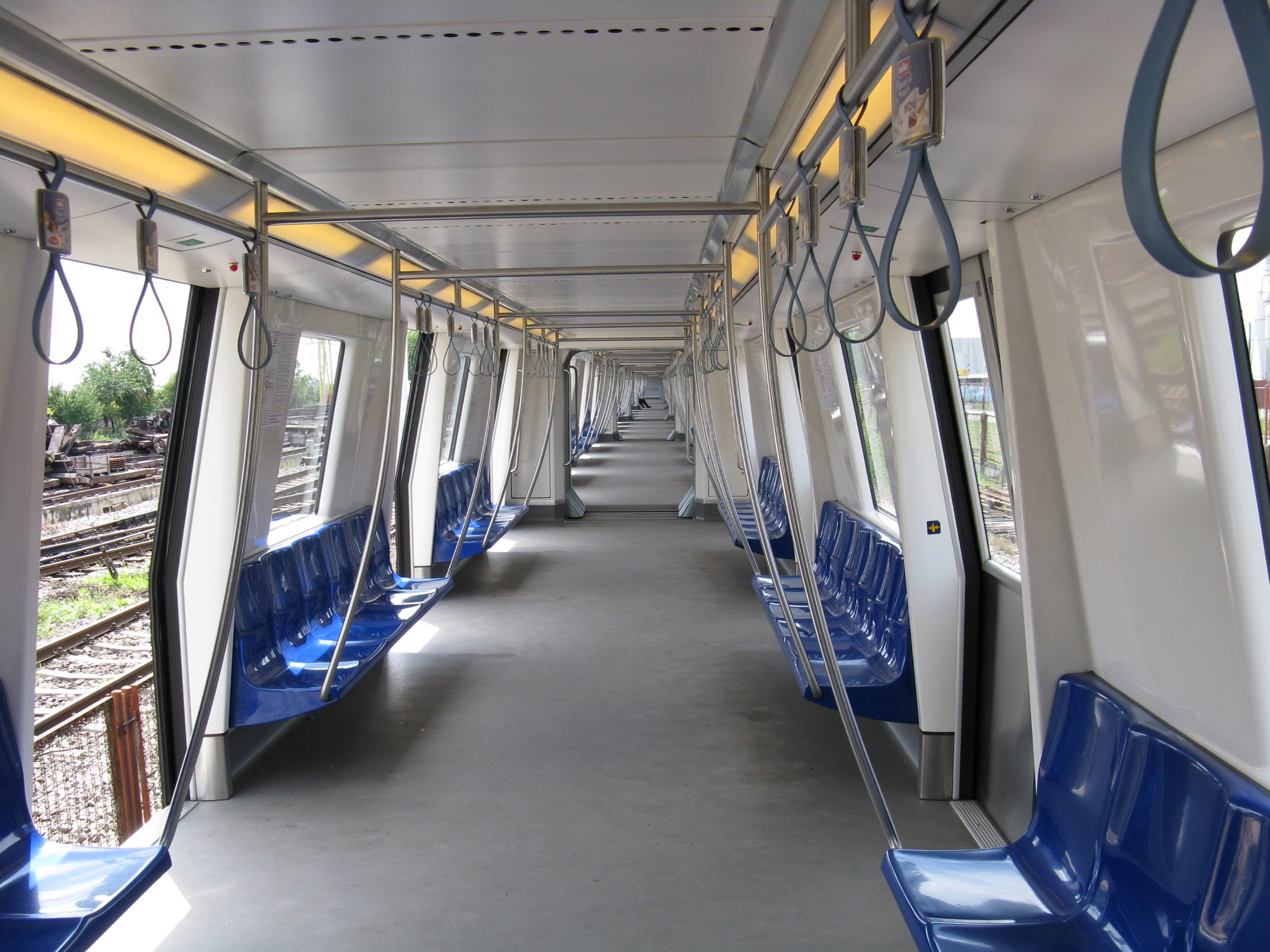 Interior ramă Bombardier Movia